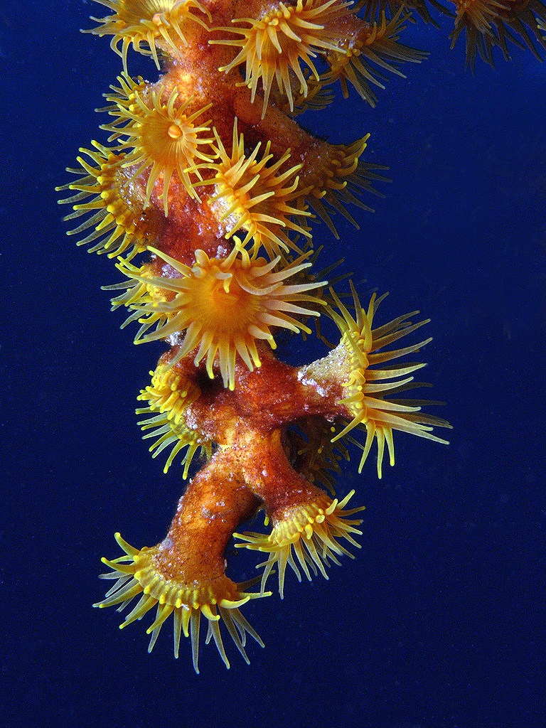 Zoántido incrustante Parazoanthus axinellae, Tenerife